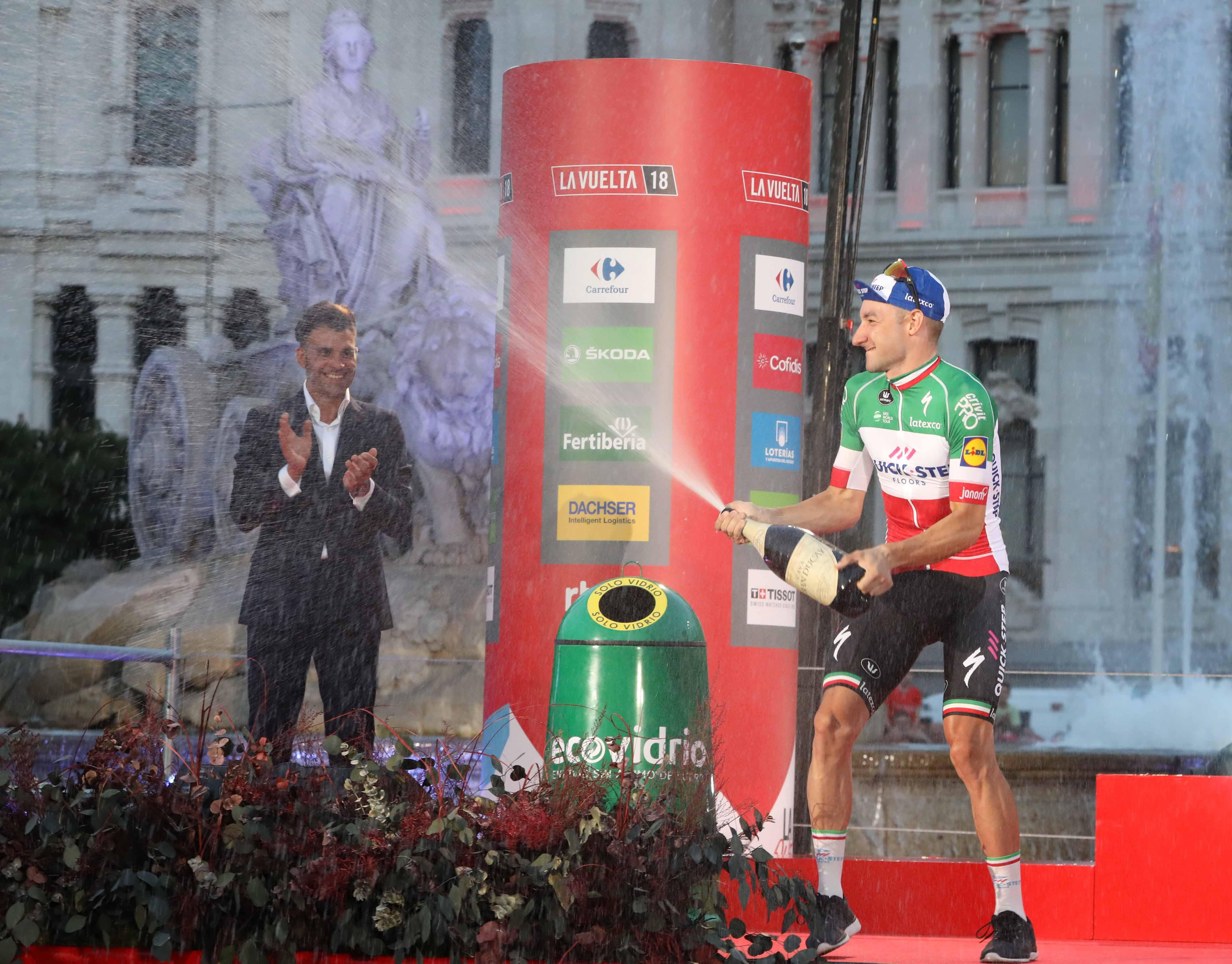 La plaza de Cibeles de Madrid ha vuelto a ser el punto final de los 3.254,7 kilómetros de la Vuelta a España 2018 cuyo ganador ha sido este año el británico Simon Yates. La alcaldesa de Madrid, Manuela Carmena, ha asistido al final de la prueba y ha entregado el trofeo al vencedor de la última etapa, el italiano Elia Viviani, además de al español Enric Mas, segundo en la clasificación general. Tras recorrer 100 kilómetros de distancia entre Alcorcón y Madrid, los corredores han dado diez vueltas al circuito urbano de 5,5 kilómetros, dentro de la última etapa, la vigésimo primera.